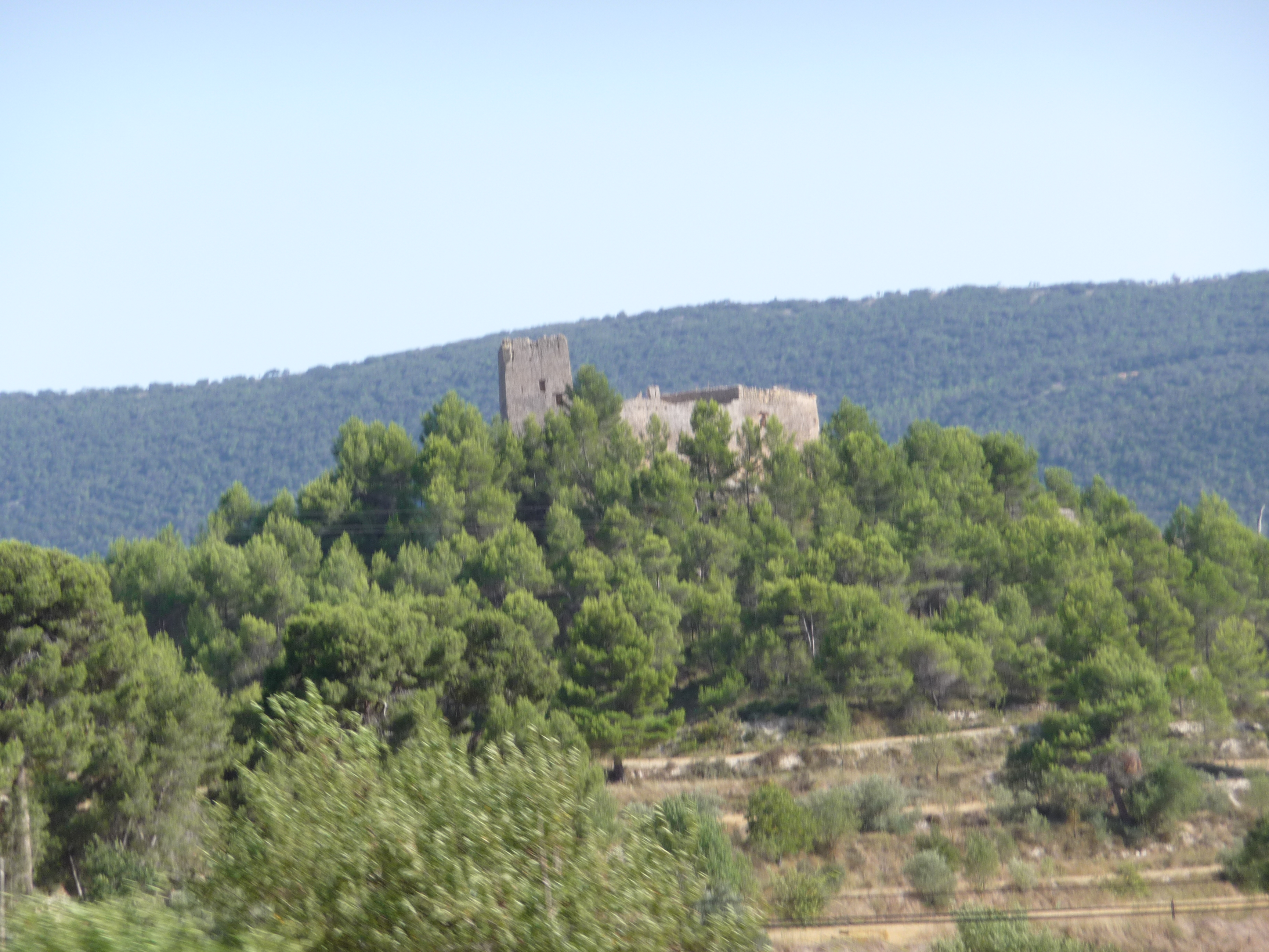 Vista general del castell de Barxell (Alcoi)